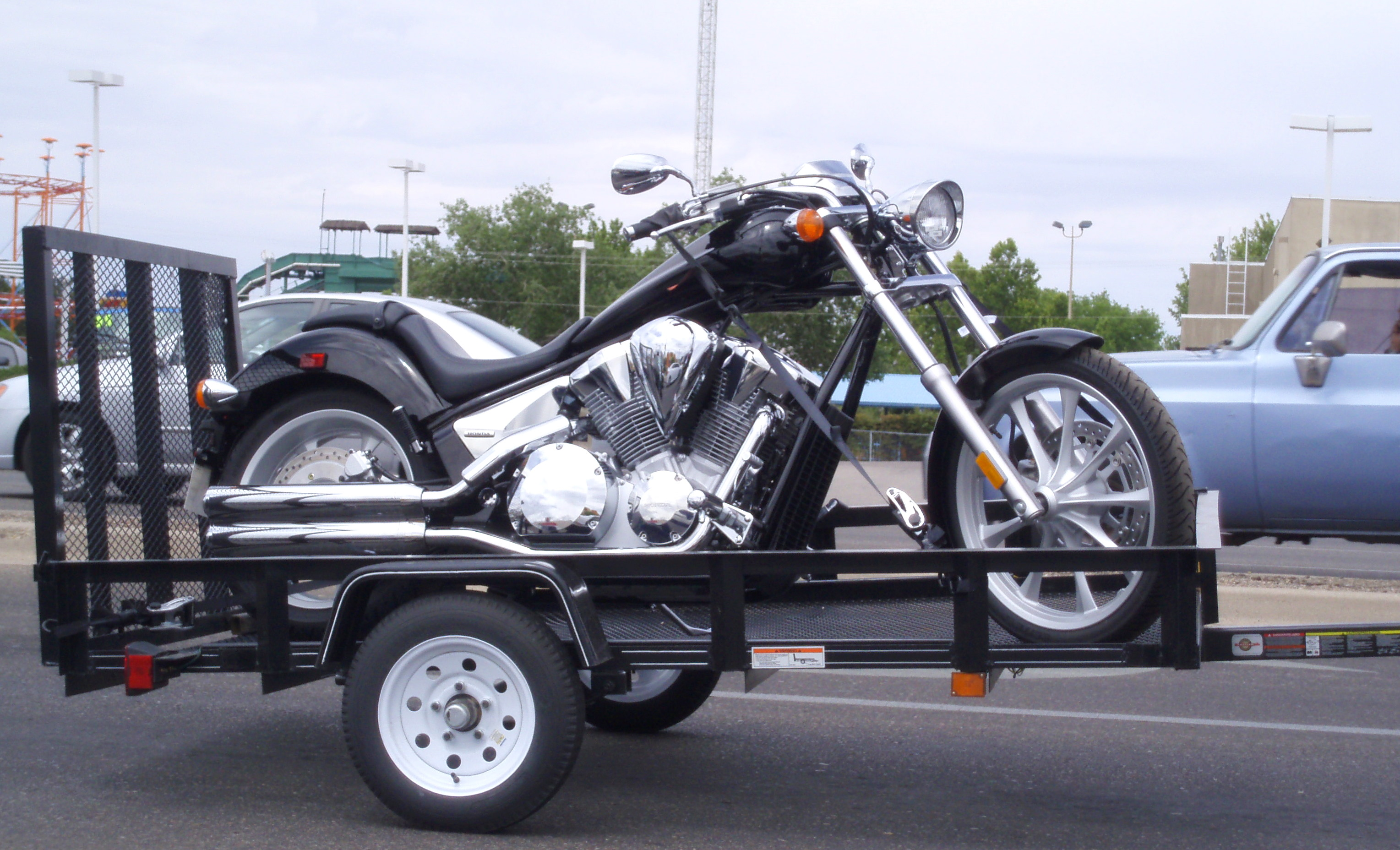 Nice bike, nice trailer